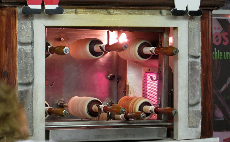 Baumstrietzel, Kürtöskalács